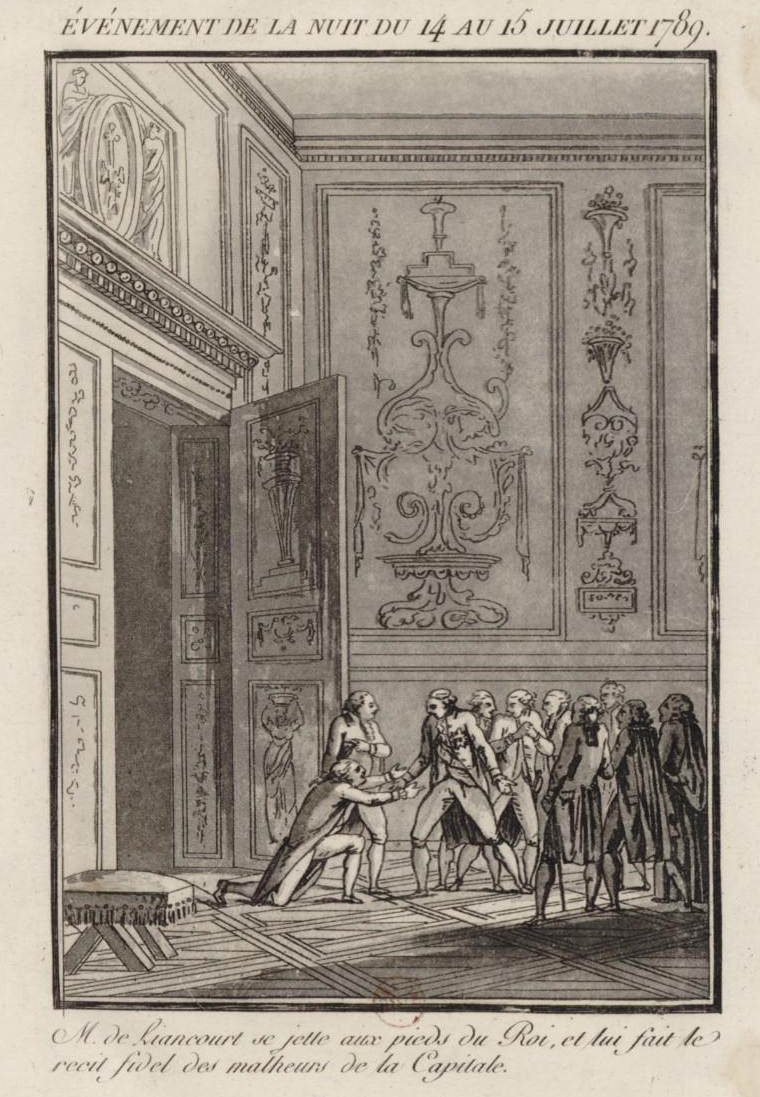 estampe. Événement de la nuit du 14 au 15 juillet 178. M. de Liancourt se jette aux pieds du Roi Louis XVI, et lui fait le récit fidèle des malheurs de la capitale.